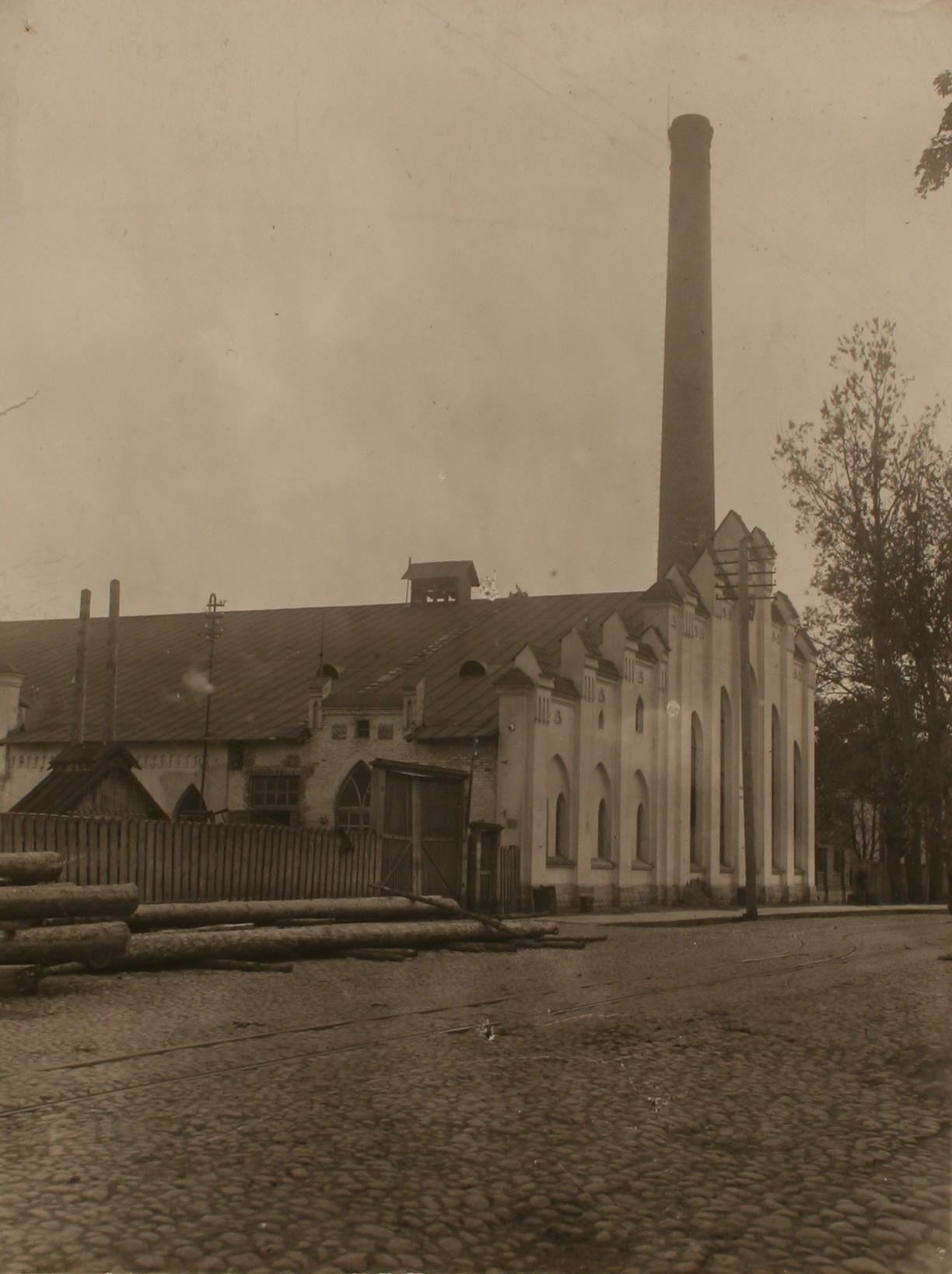 Беларуская (тарашкевіца): Менск (Miensk), вуліца Захараўская (vulica Zacharaŭskaja) каля скрыжаваньня з Садовай (vulica Sadovaja). Першая менская электрастанцыя